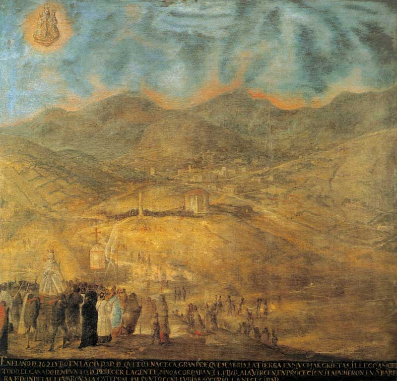 öleo "milagro de la virgen de Guápulo" del Pintor Miguel de Santiago de la escuela quiteña año 1757.